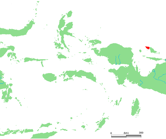 ID Supiori.PNG